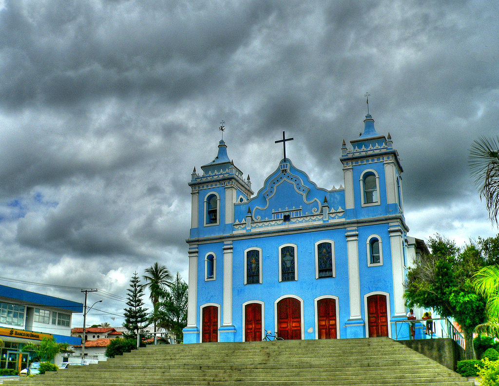 Igreja Senhor do Bom fim (Matriz) em Brumado, Bahia, Brasil.